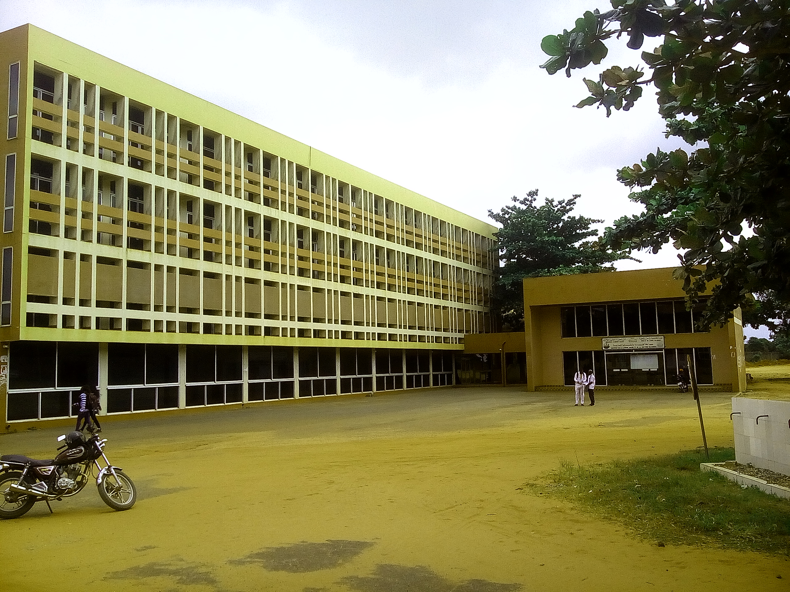 ILACI CAMPUS BÉNIN